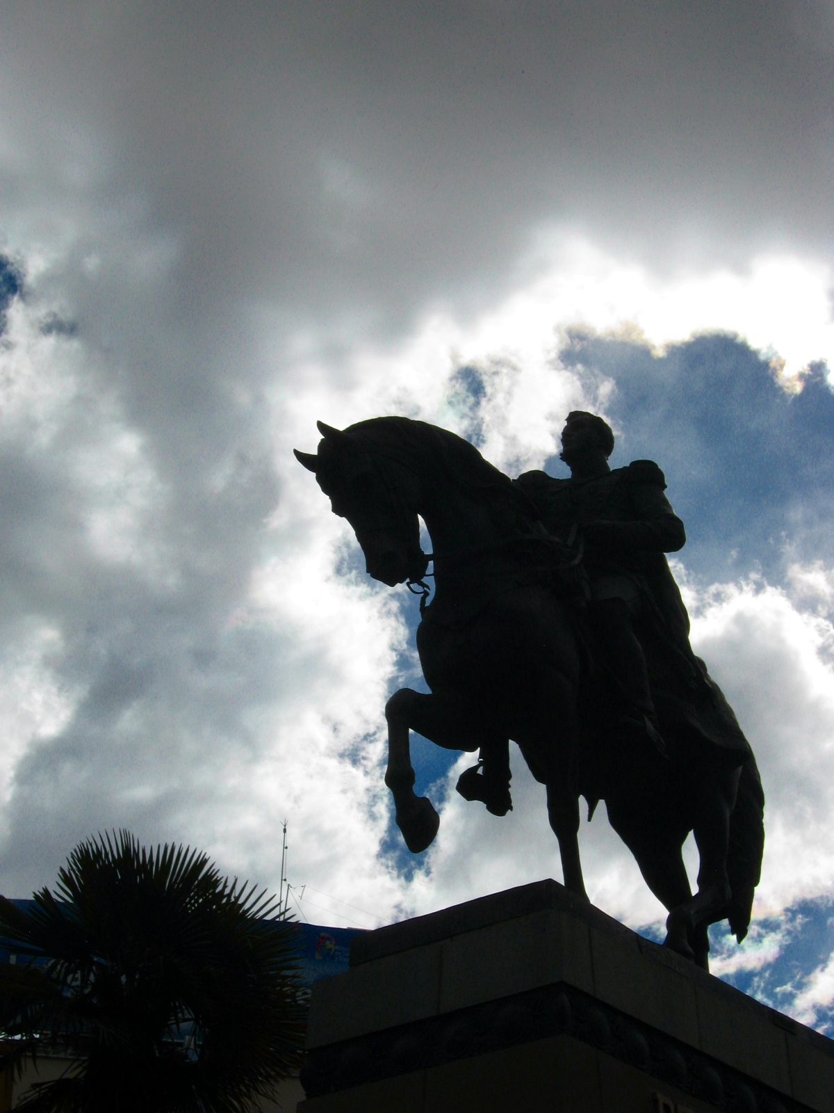 Antonio José de Sucre This medium shows the protected monument with the number L/00-203 in Bolivia.